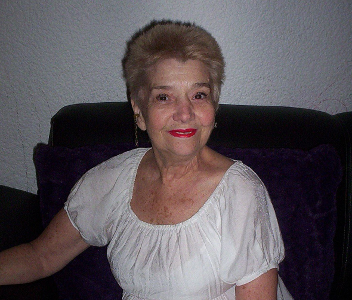 Les mando un beso y ponganselo donde quieran